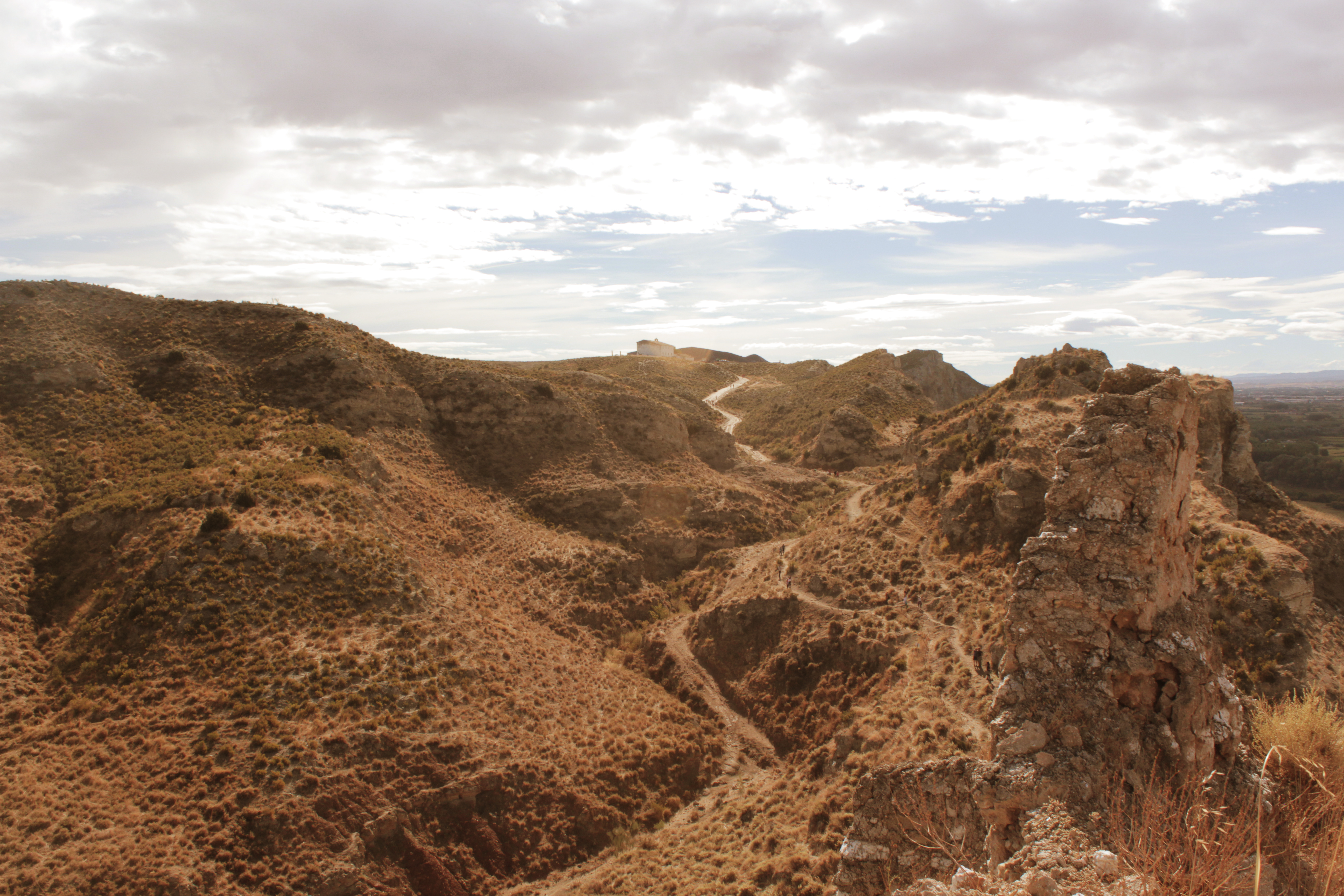 Ermita de la Virgen de El Castellar vista desde las ruinas de la ciudad del mismo nombre, en Torres de Berrellén (Zaragoza, España).